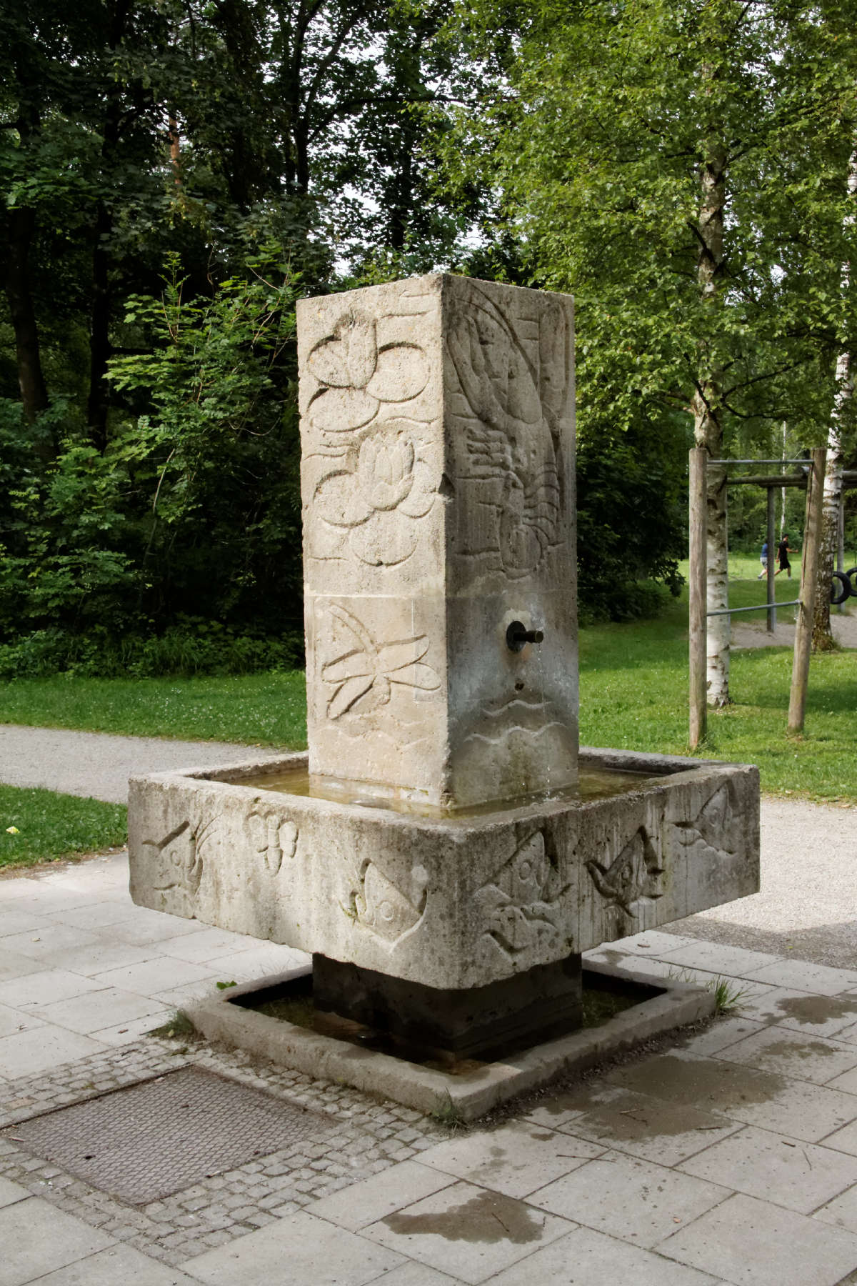 München, Brunnen mit Tierreliefs von Christian Wrede in den Isarauen in Untergiesing, Nähe Entenweiher